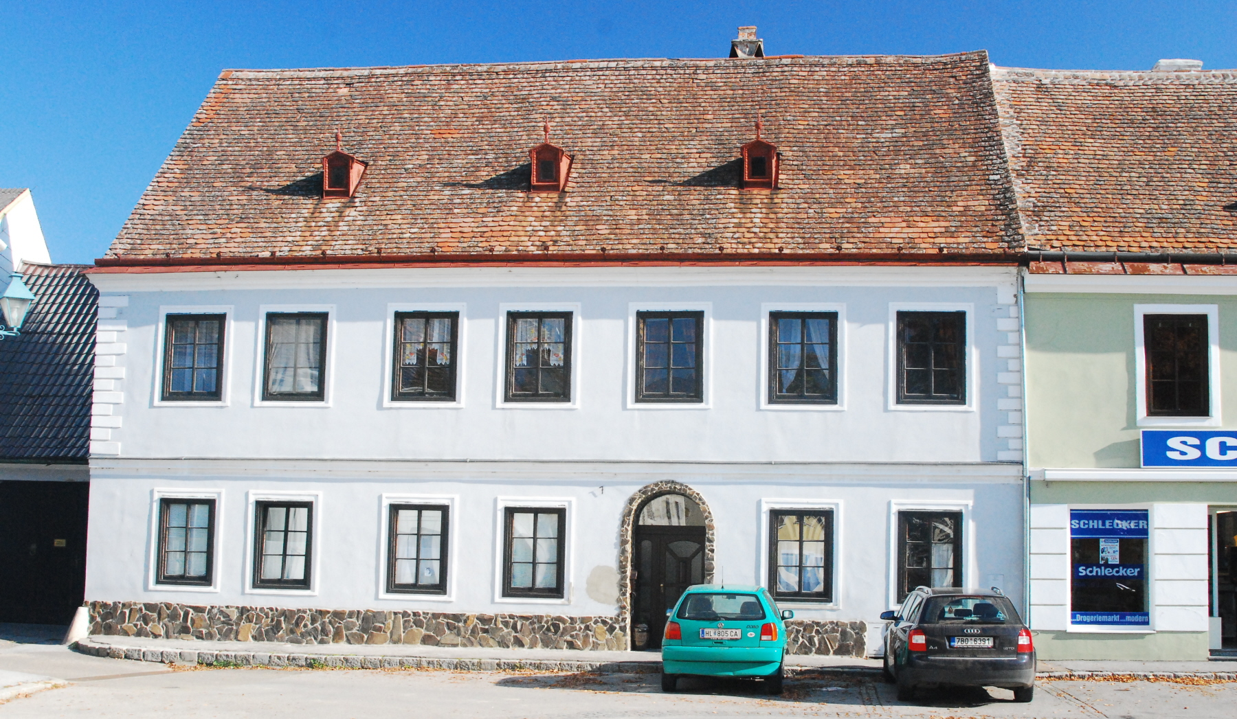 Wohnhaus